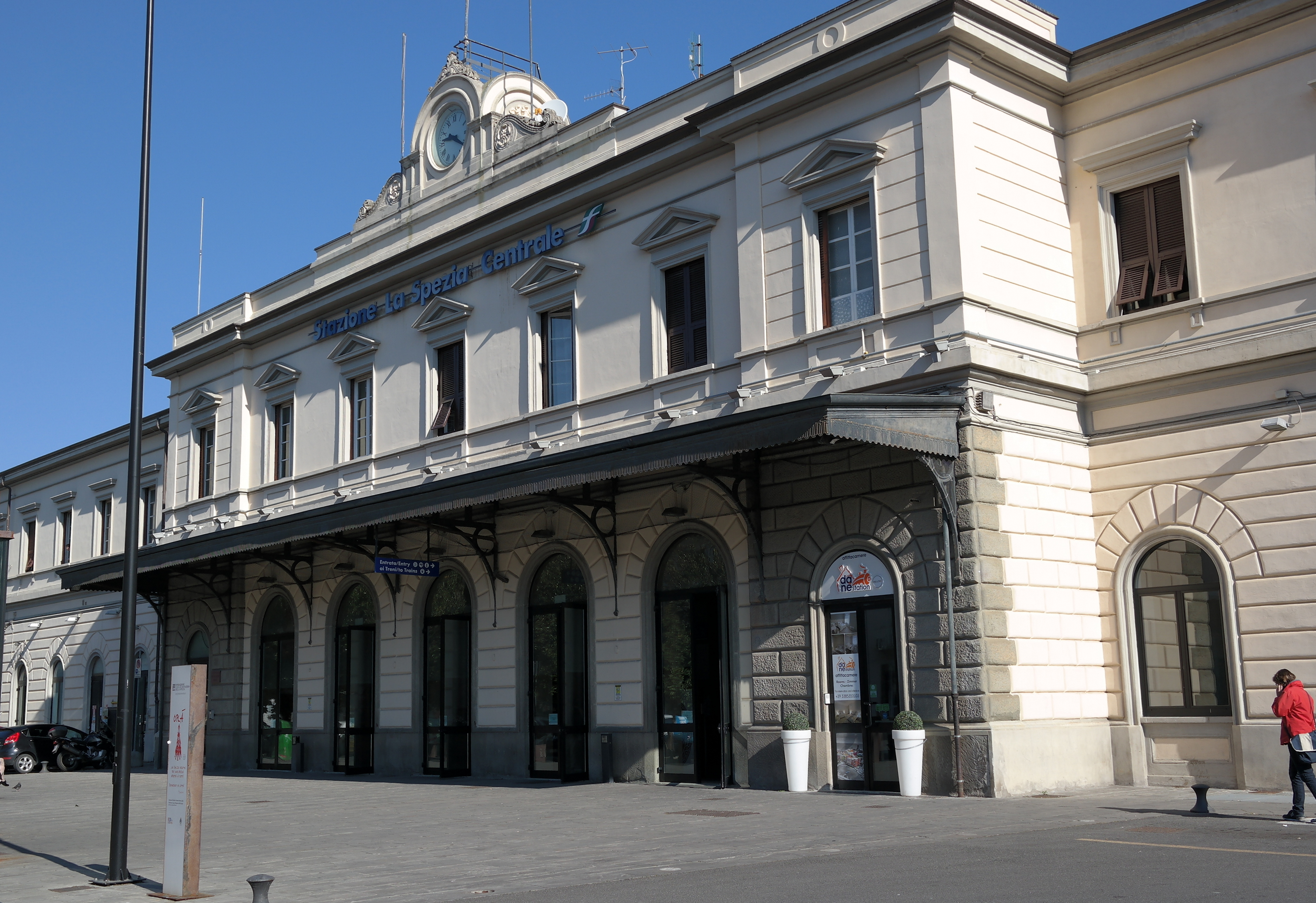 Stazione ferroviaria di La Spezia